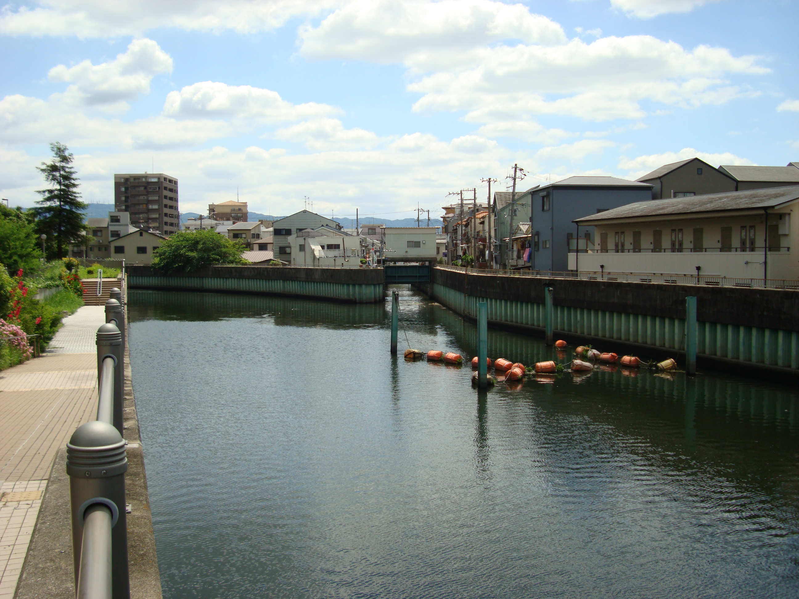 大阪市城東区の第二寝屋川と長瀬川の合流地点